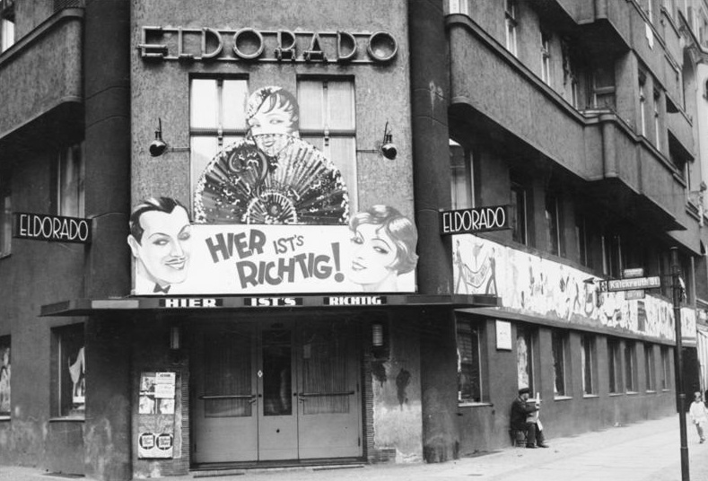 Berlin, Bar "Eldorado" Berlin: Das Vergnügungsetablissement "Eldorado" an der Ecke Motz- und Kalckreuthstraße. (Aufn.: 1932) 12933-32 [Berlin.- Homosexuellentreffpunkt "Eldorado", Plakat über Eingang "Hier ist's richtig"]